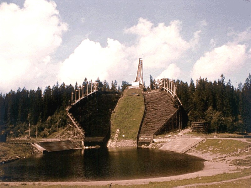 Holmenkollen-Schanze 1975 Fotograf: presse03, selbst erstellt, Sommer 1975 Lizenz: GNU-FDL Früher wurde im Sommer die Auslaufgrube gewassert und als Schwimmbad benutzt.